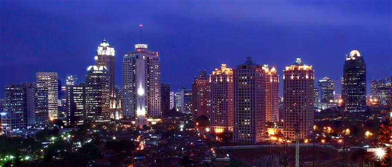 Jakarta Indonesia taken from Shangrila Hotel.